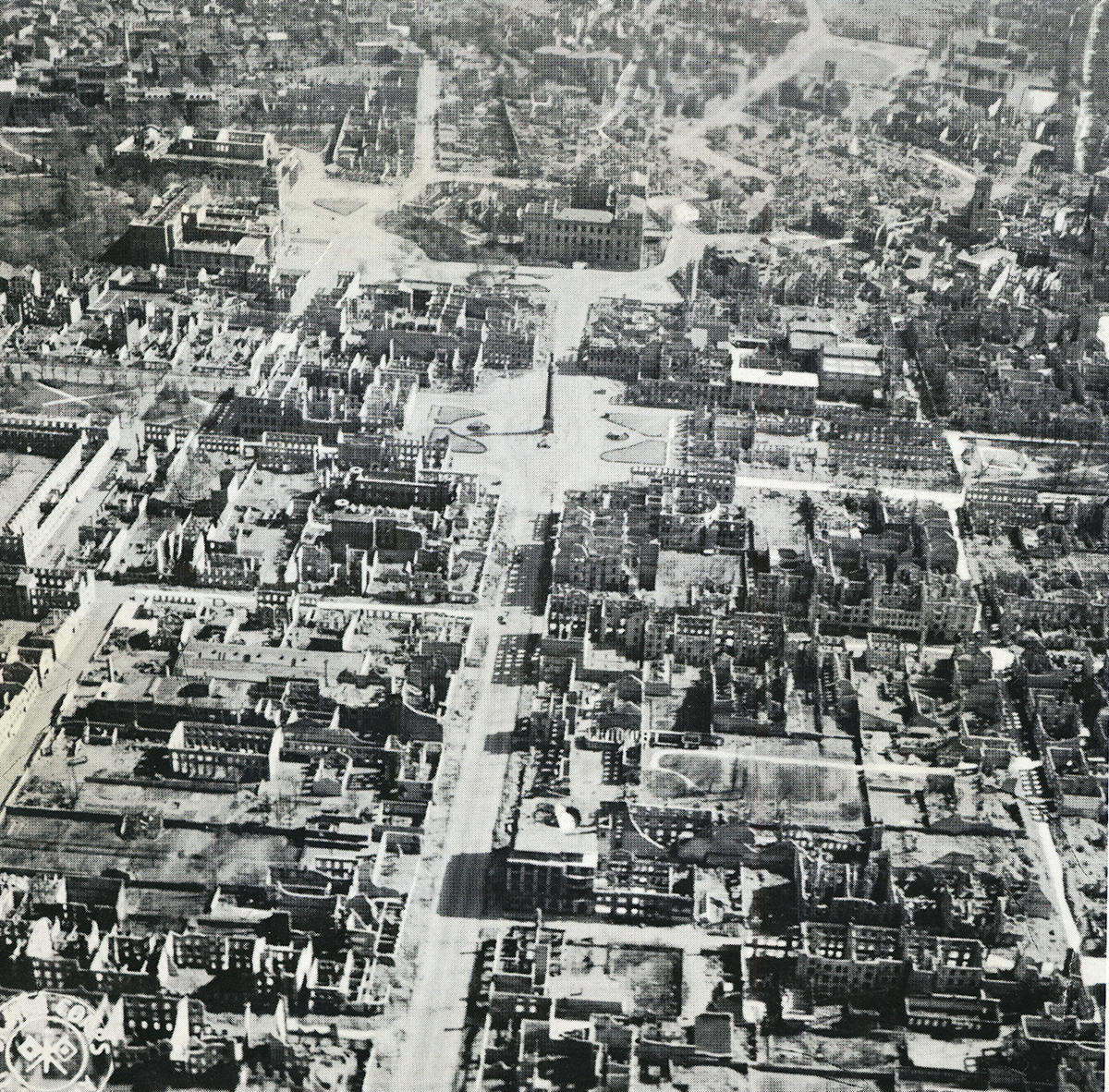 Luftaufnahme von Darmstadt mit Kriegszerstörung der Brandnacht vom 11. September 1944